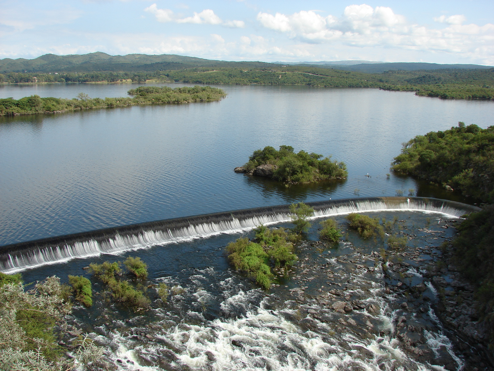 Calamuchita Department, Cordoba, Argentina